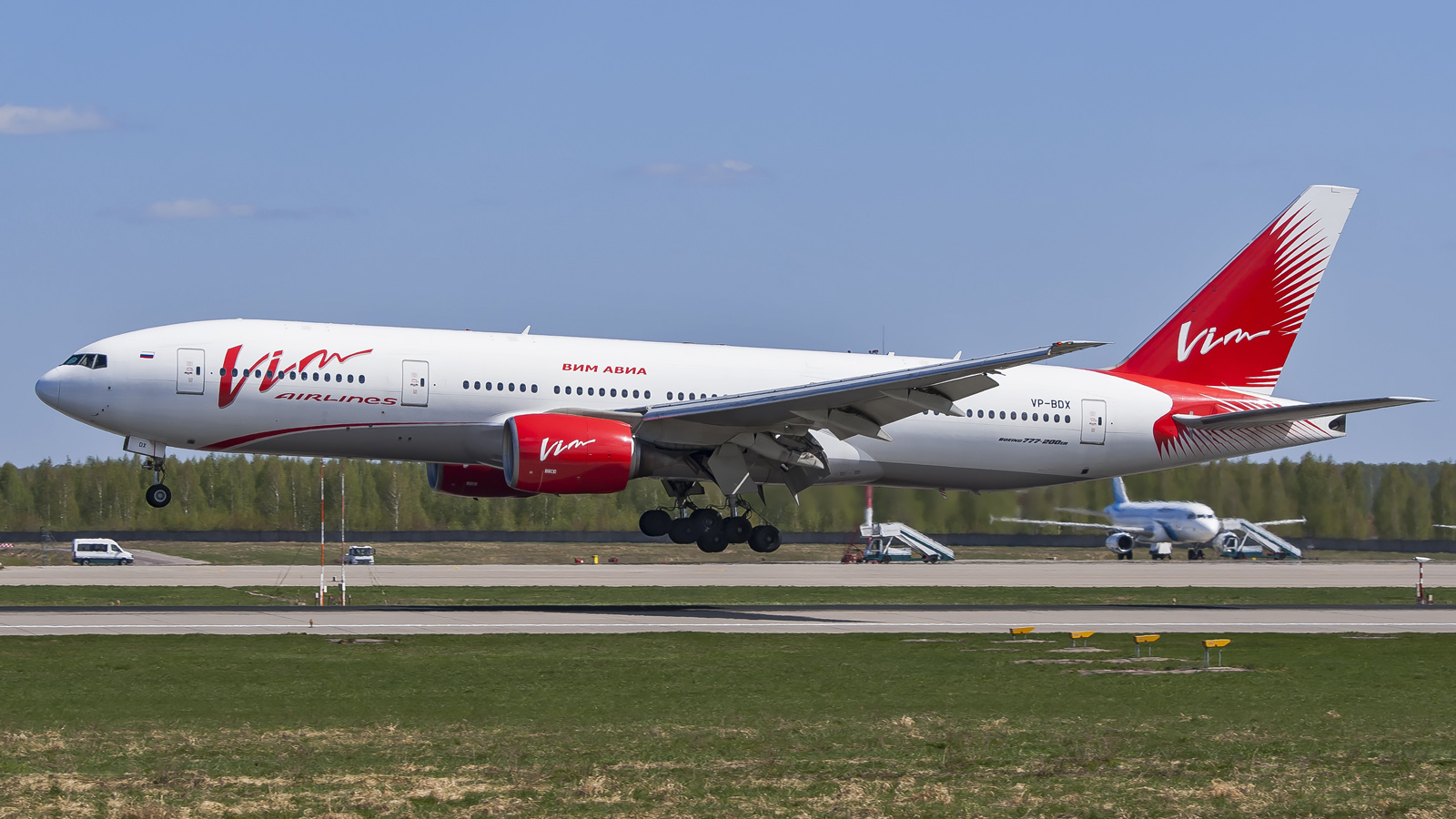 VP-BDX Boeing 777-200 VIMavia DME | UUDD